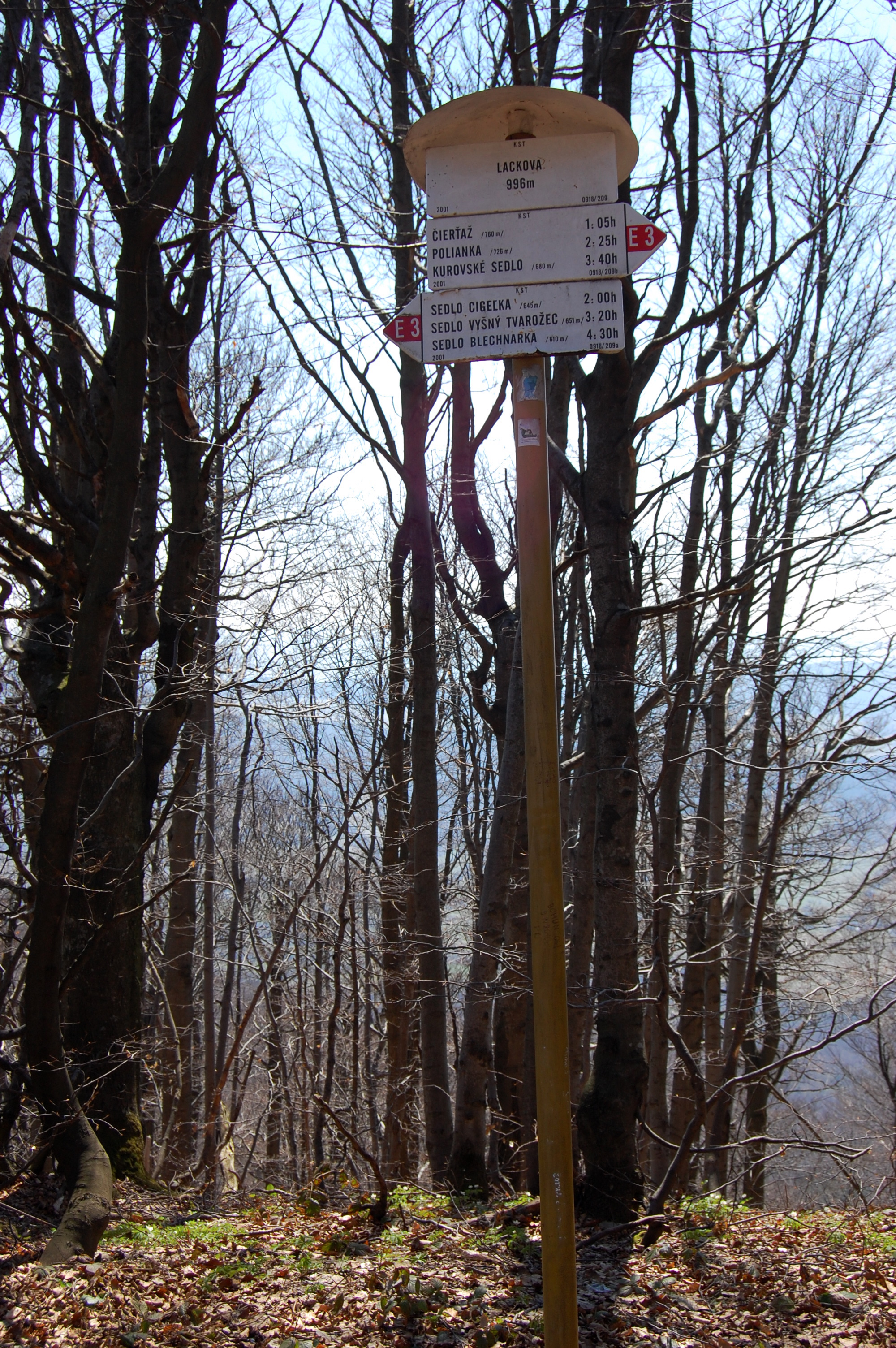 Słowacki grzybek na szczycie Lackowej